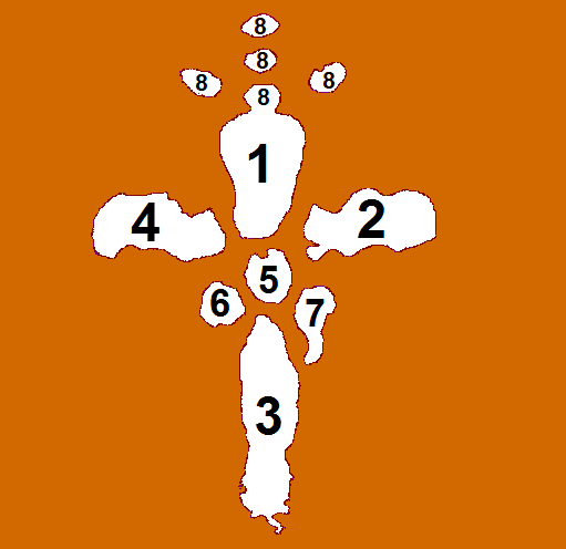 Summary Épeire diadème Araneus diadematus Clerk : Petite araignée de jardin